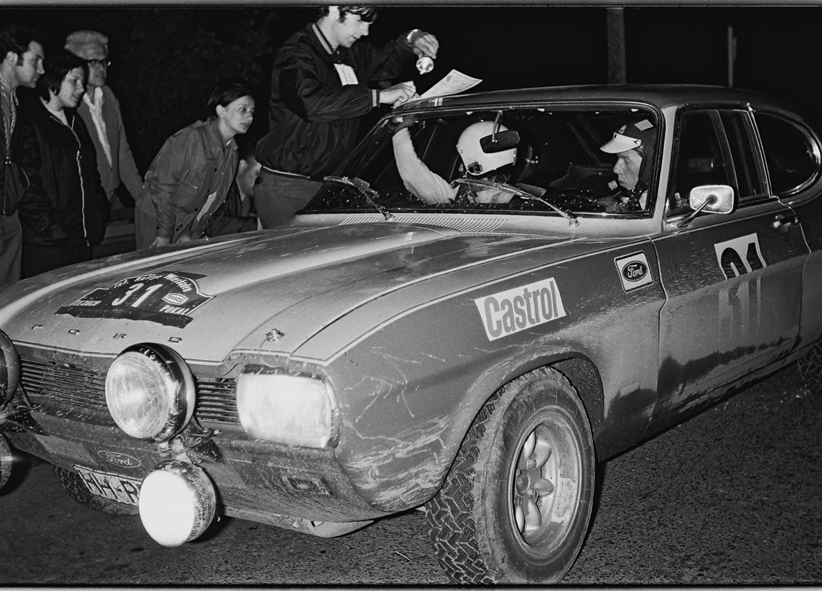 Gesamtsieger Rallye Wiesbaden1971 ( Röhrl - Marechek )